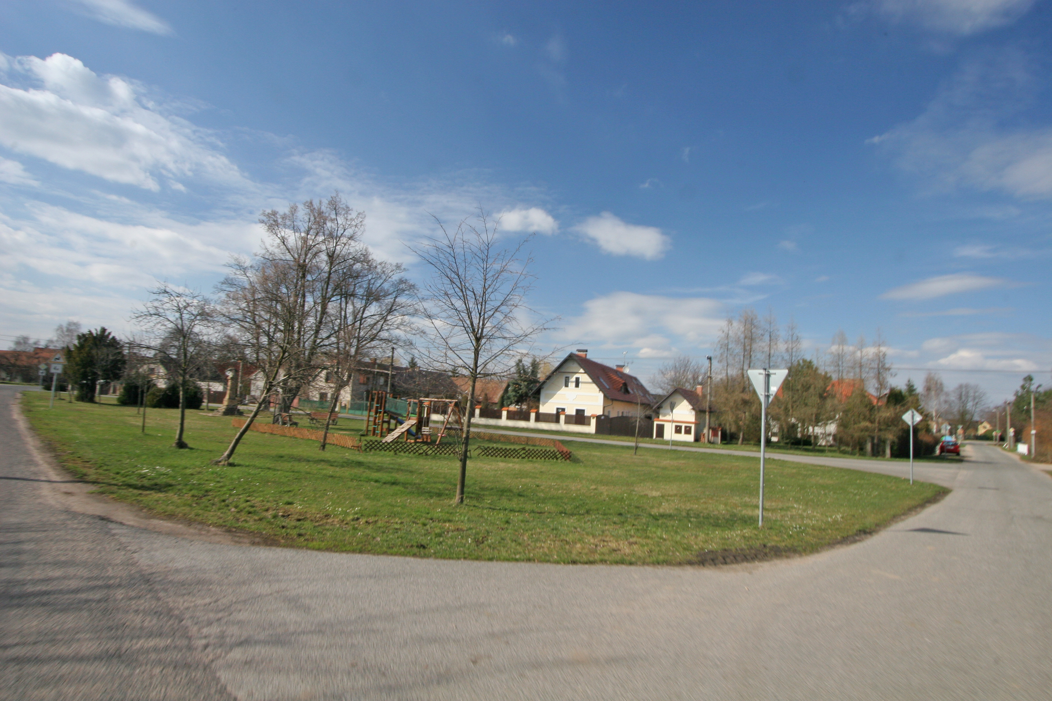 Písek náves